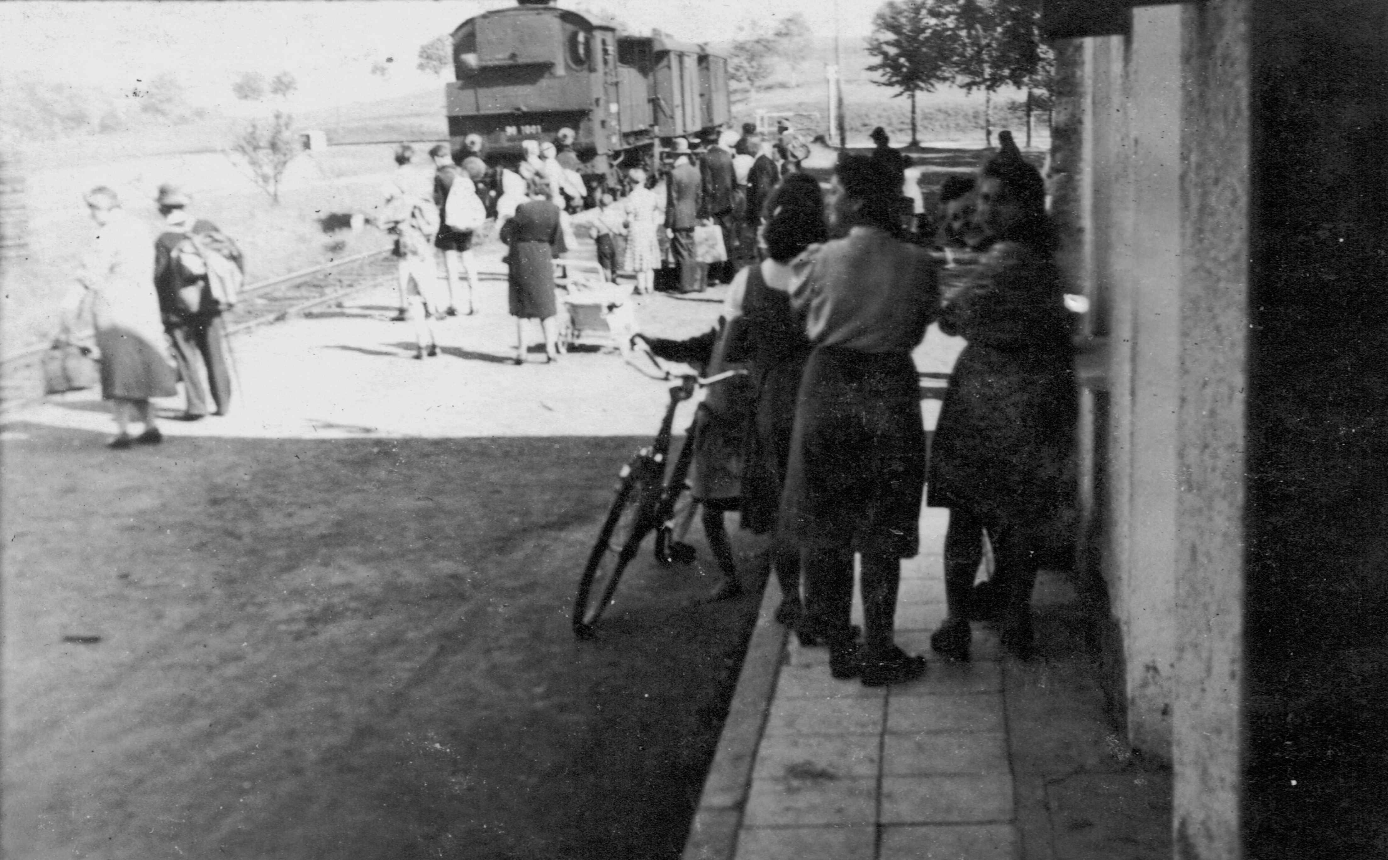 Einfahrt Dampflokomotive (BR 98.10) von Falkenstein nach Gfäll.